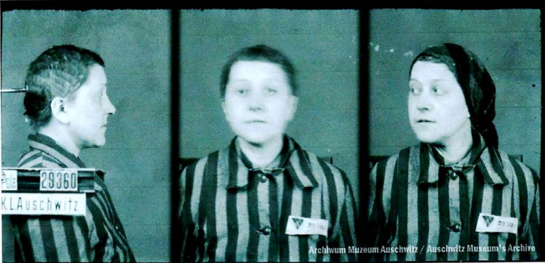 ( P-Pole Nr.29360 )